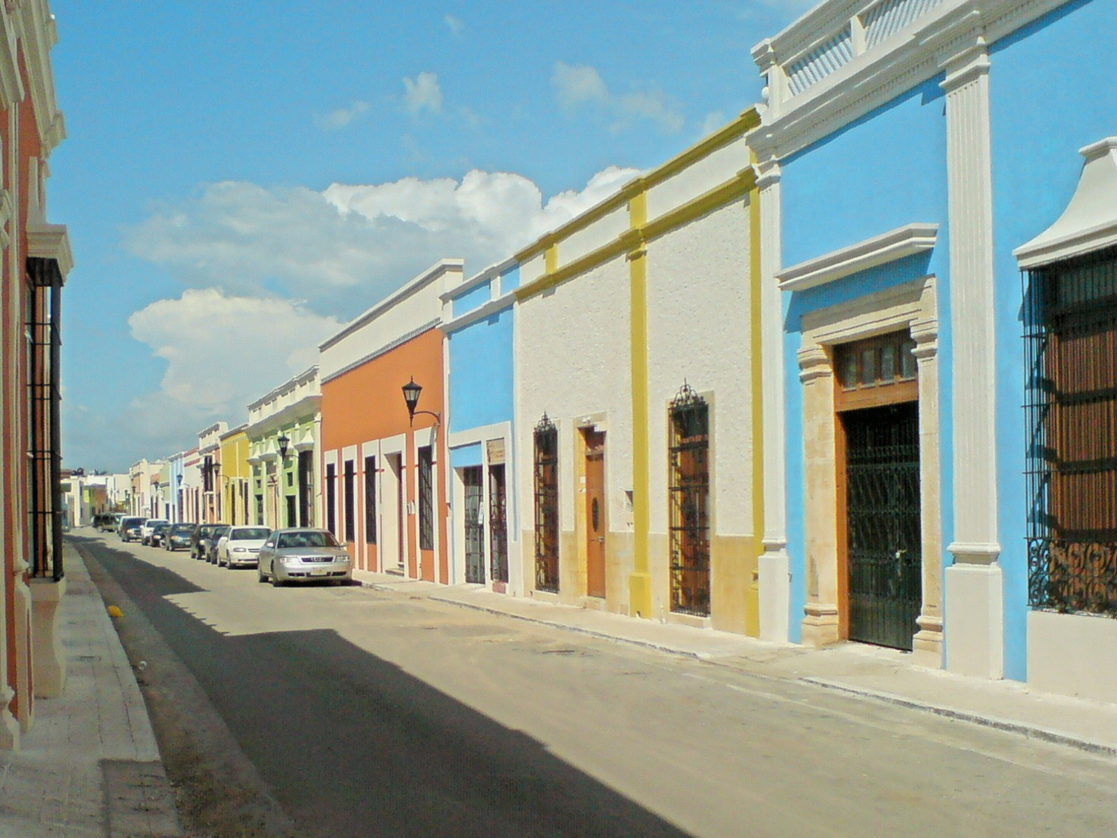 Calle en el Barrio Histórico de San Francisco. Viejo San Francisco de Campeche, estado de Campeche, México.